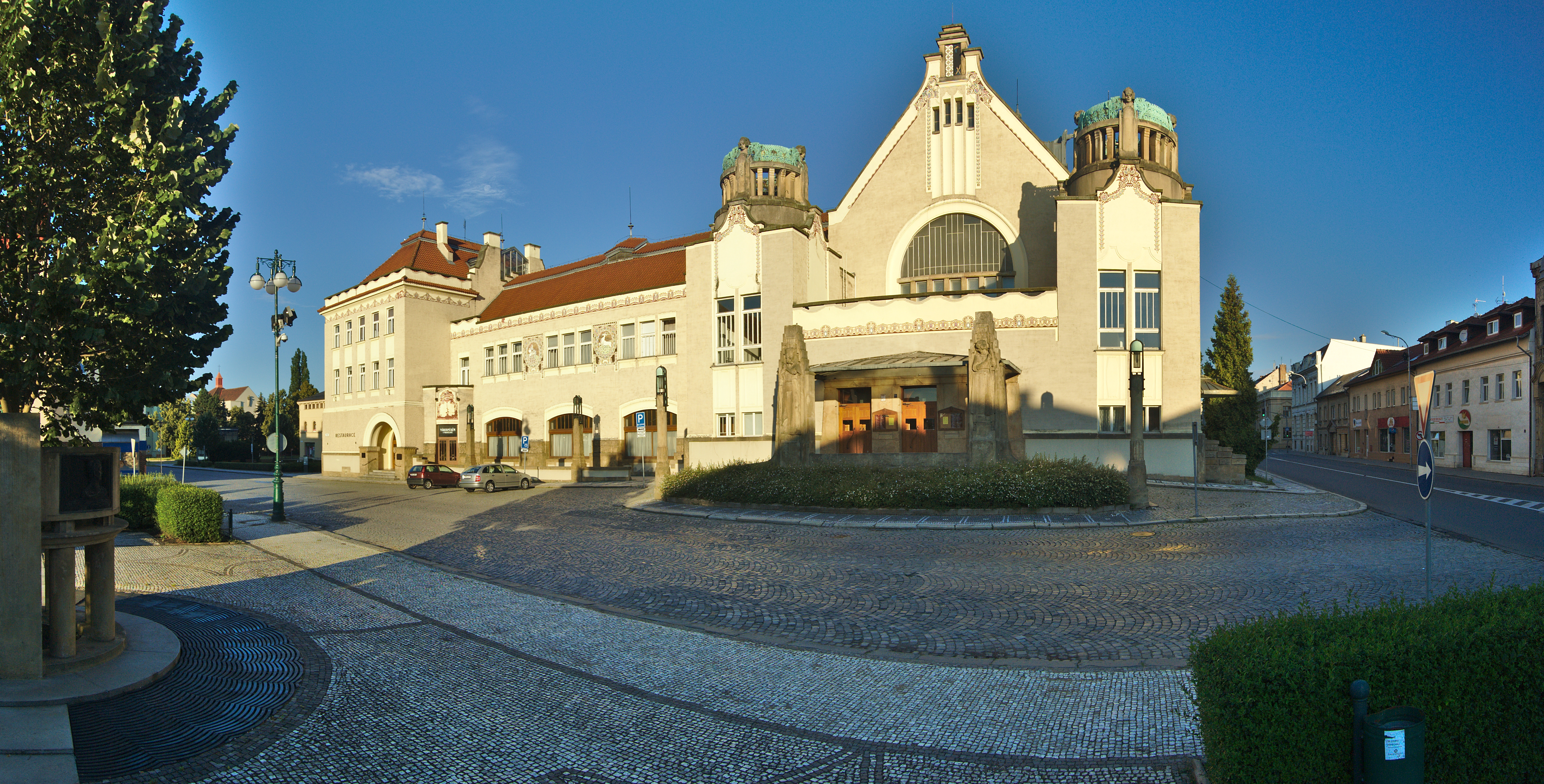 Národní dům - panorama, Prostějov